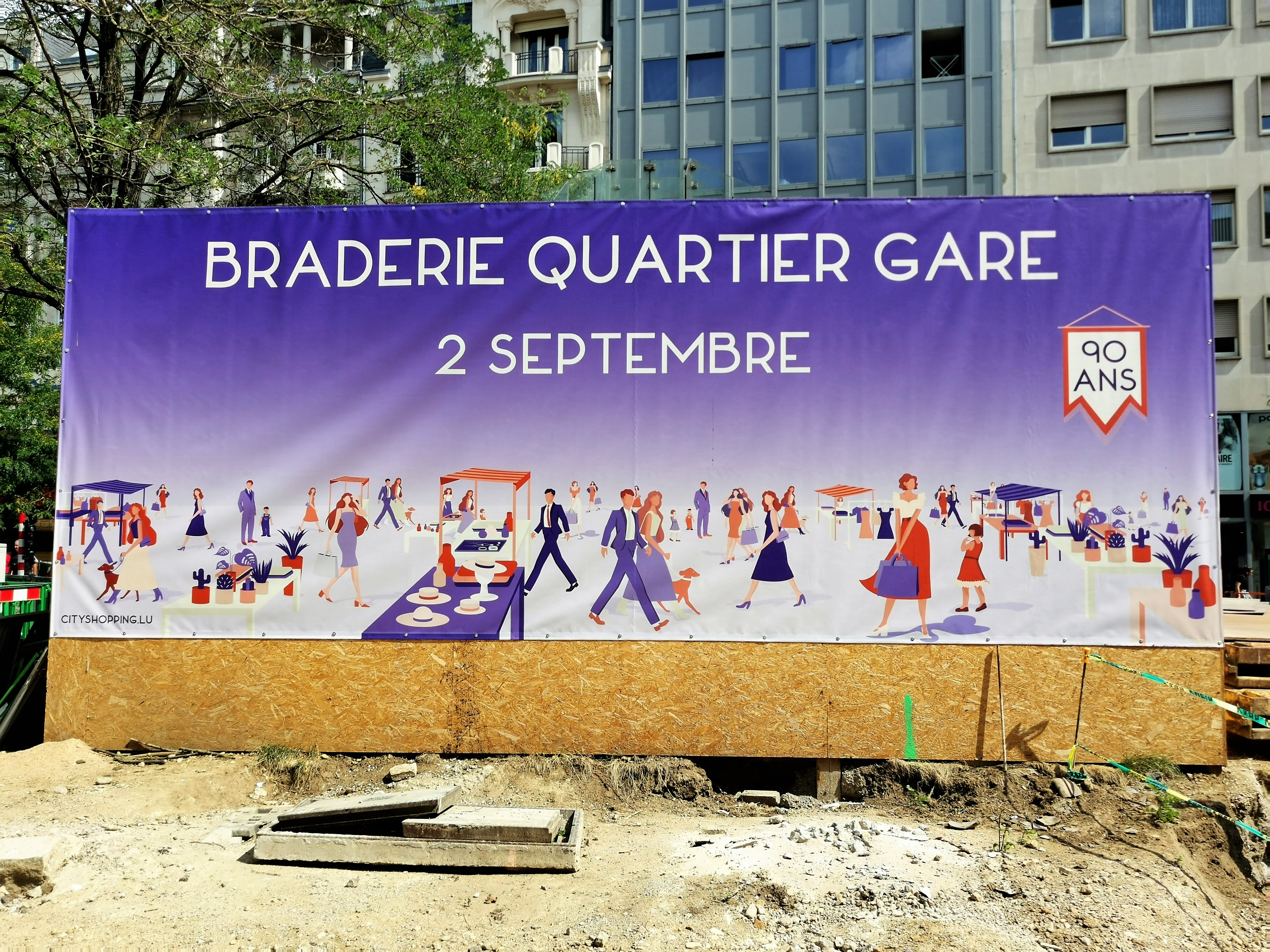 Luxembourg, affiche annonçant la Braderie du 2 septembre 2019 au quartier de la Gare.